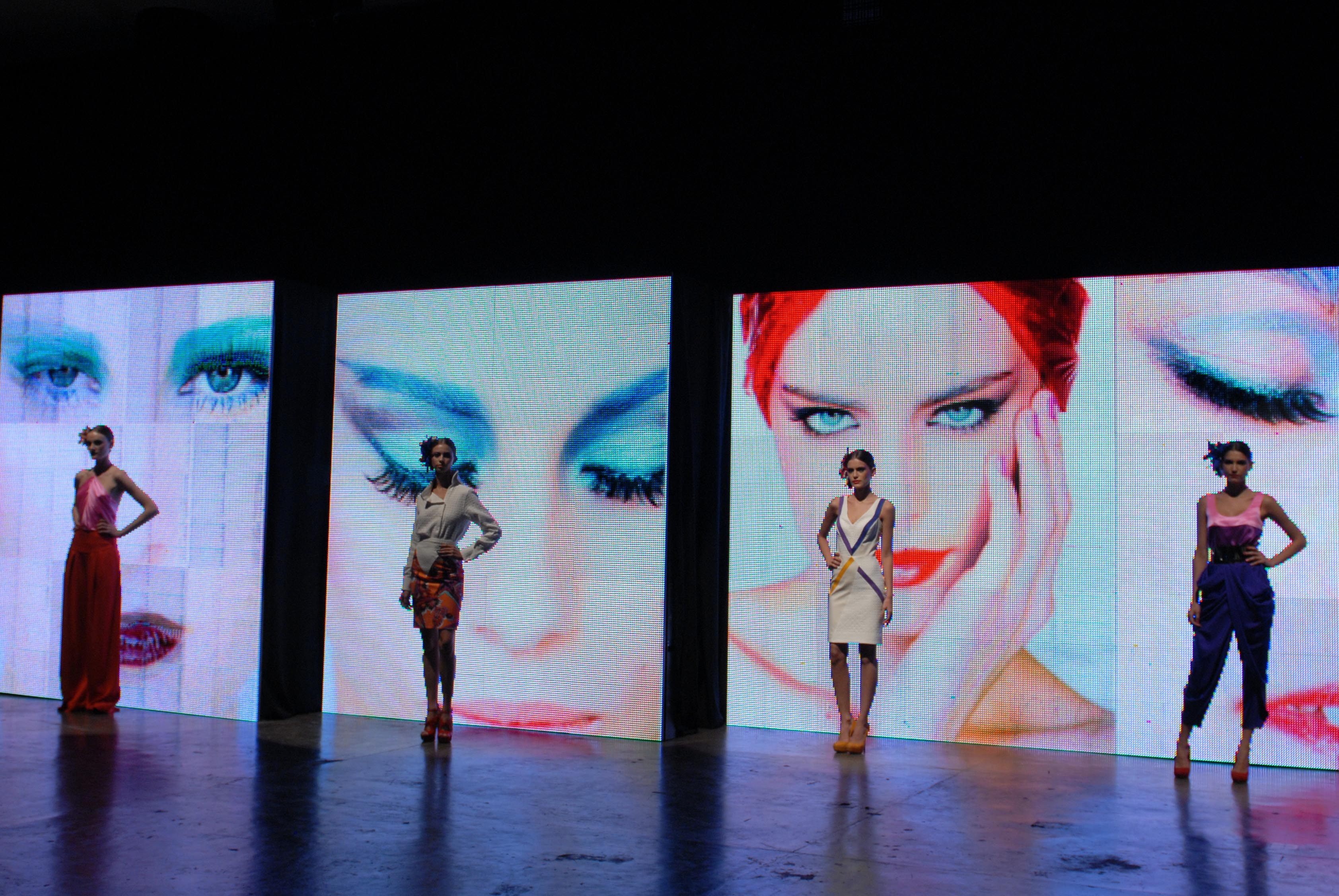 Foto: Marcos Madi